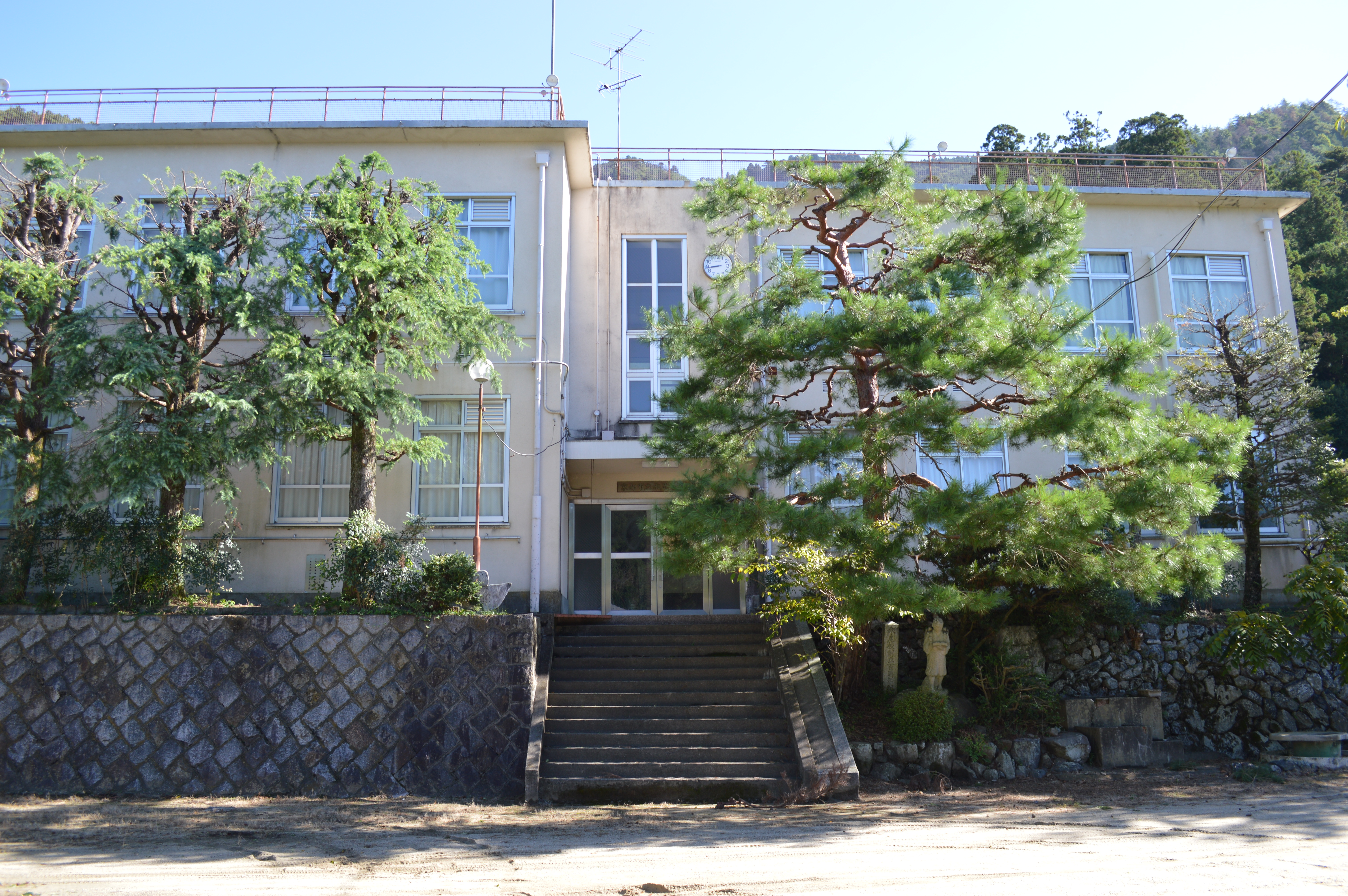 京都市右京区嵯峨水尾にある水尾小学校（休校中）